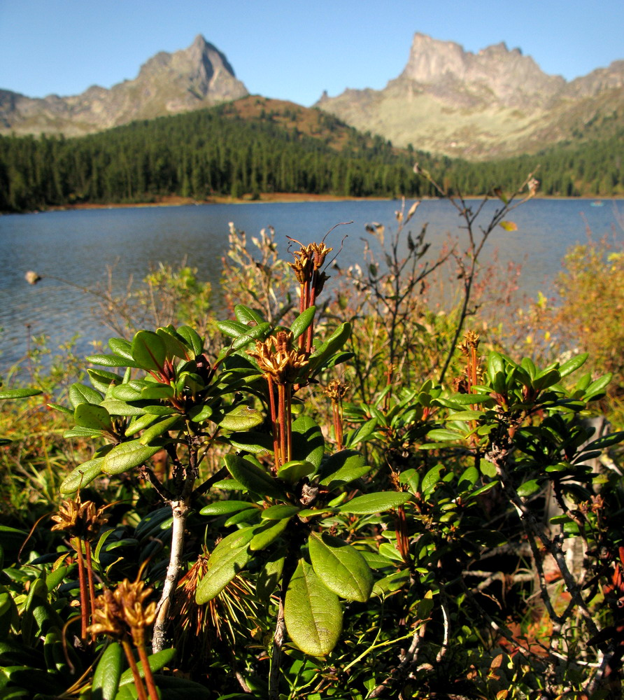 Плодоносящий рододендрон золотистый (Rhododendron aureum). Западный Саян, парк "Ергаки", берег озера Светлого.